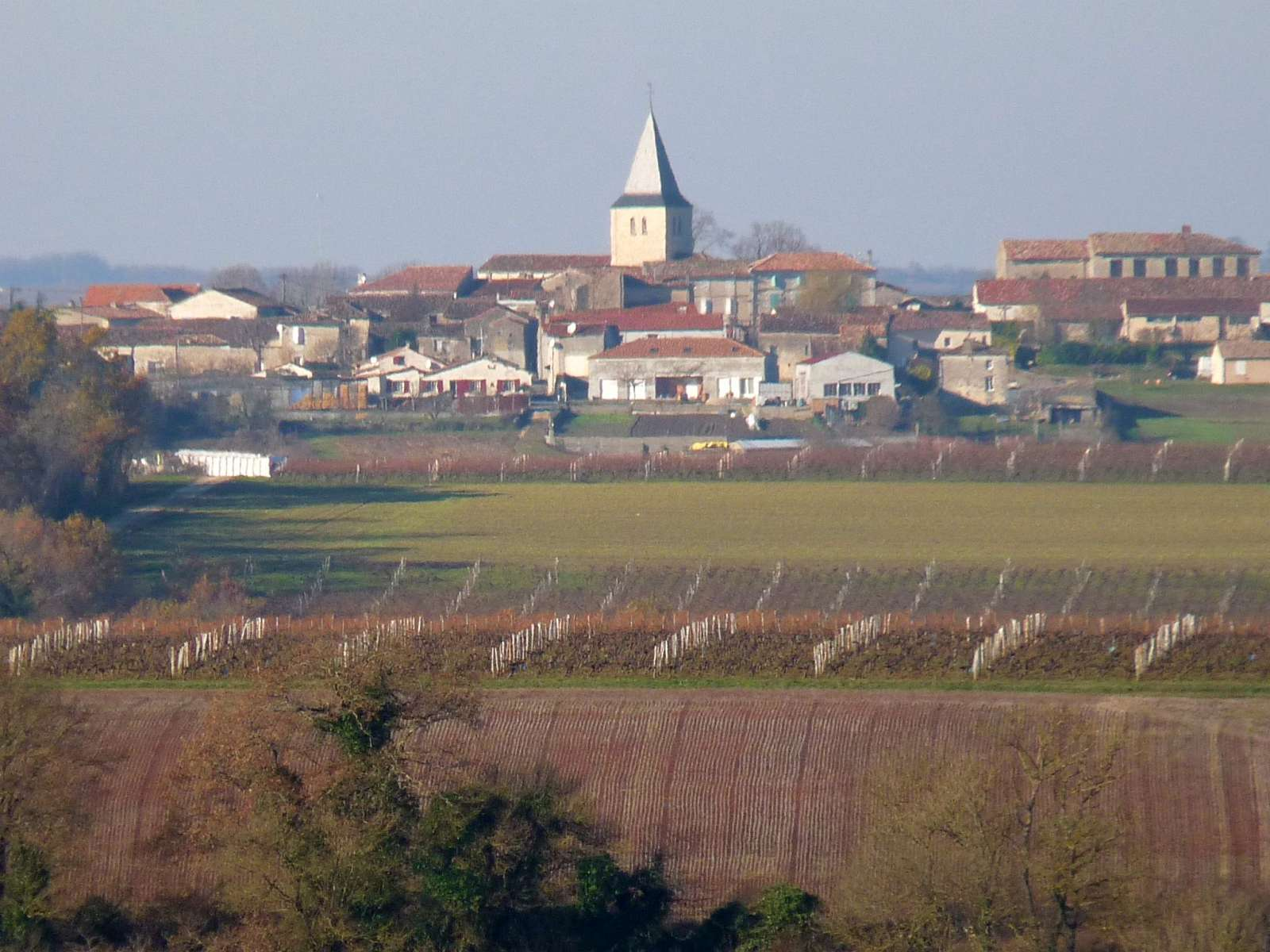 St-Genis-d'Hiersac vu depuis la D.96, Charente, France